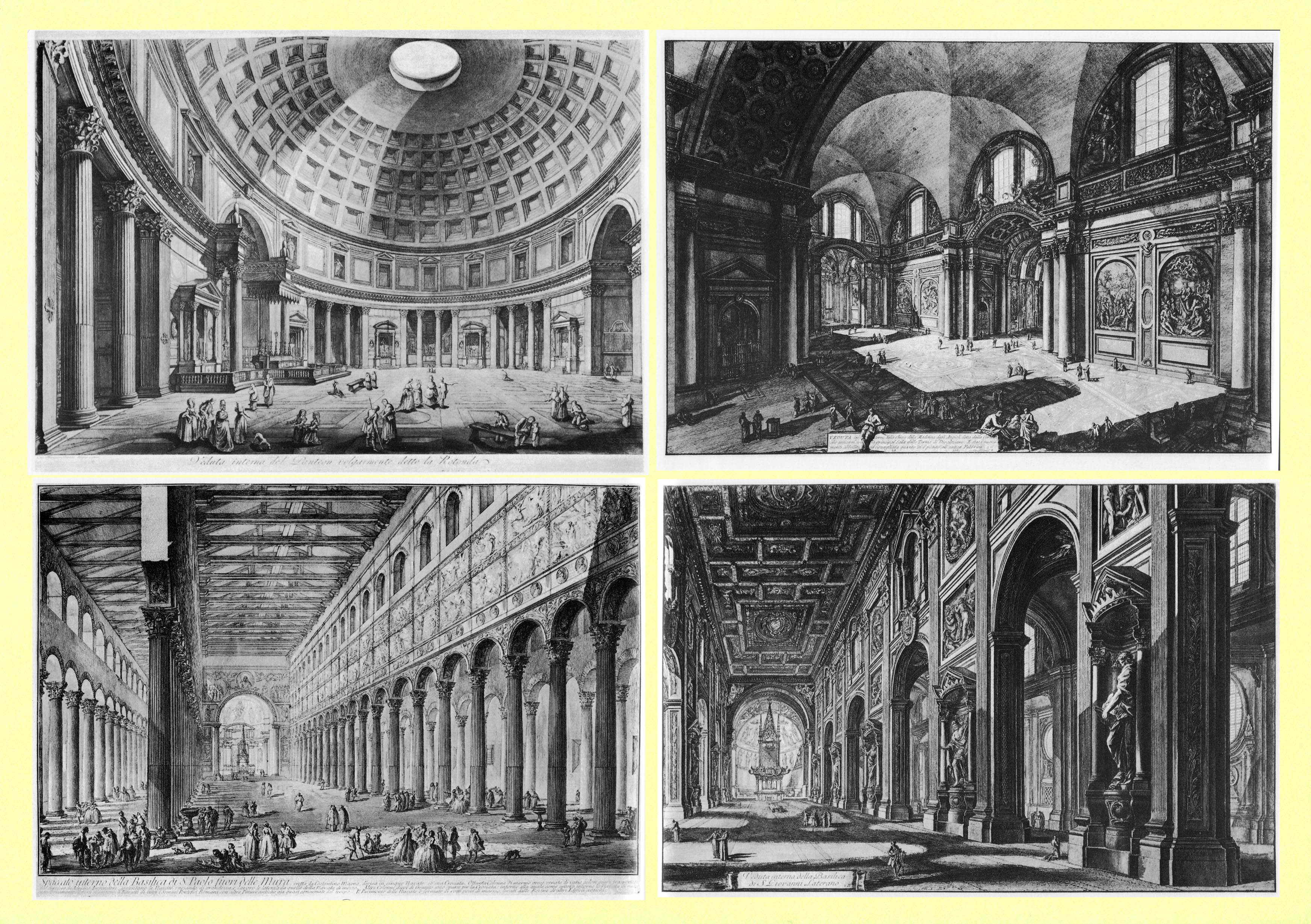 Piranesi vedutái